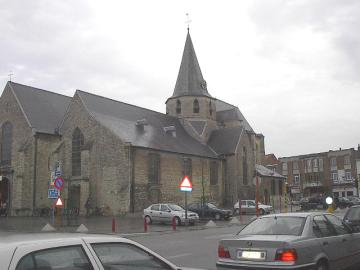 Heilig kruiskerk in Zwijndrecht